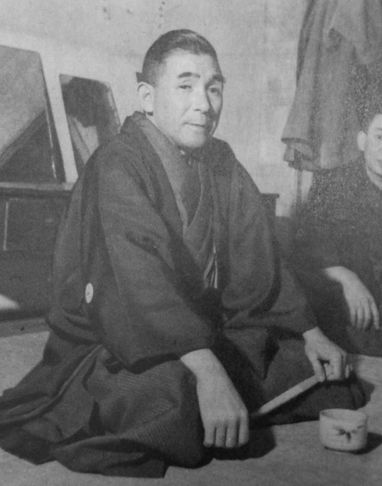 六代目春風亭柳橋